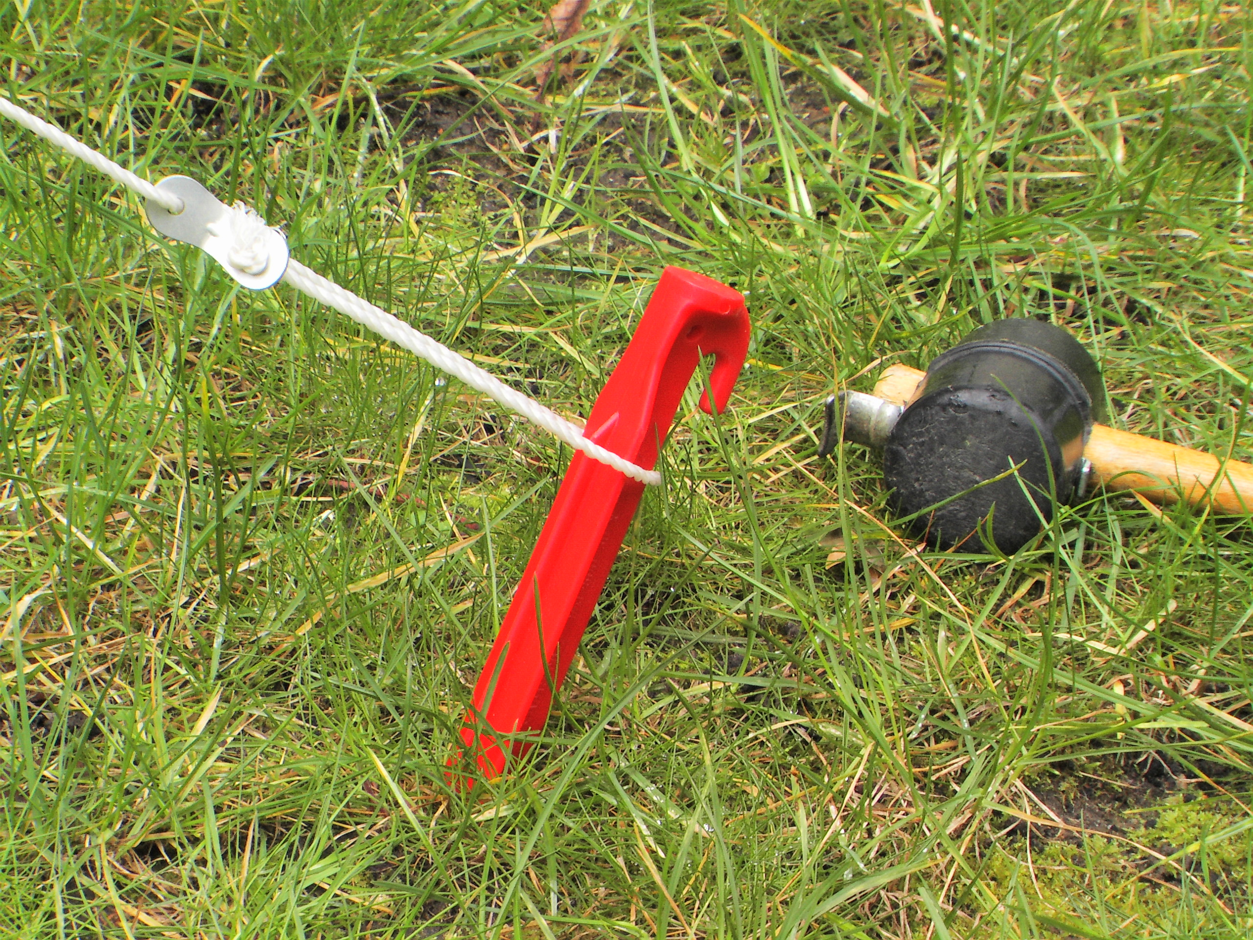 Halb in den Boden versenkter Hering